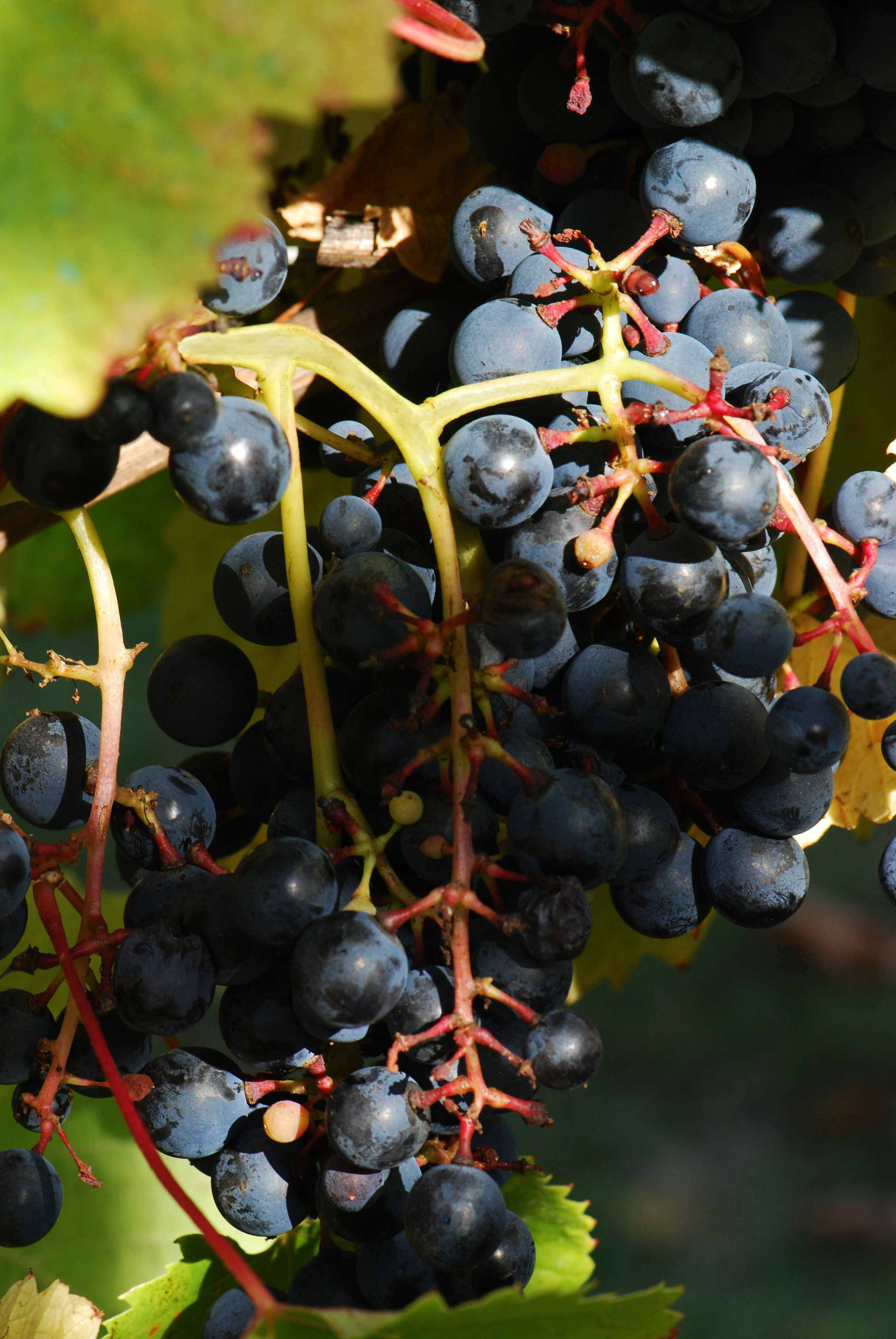 Tannat, conservatoire du vignoble charentais, Cherves 17